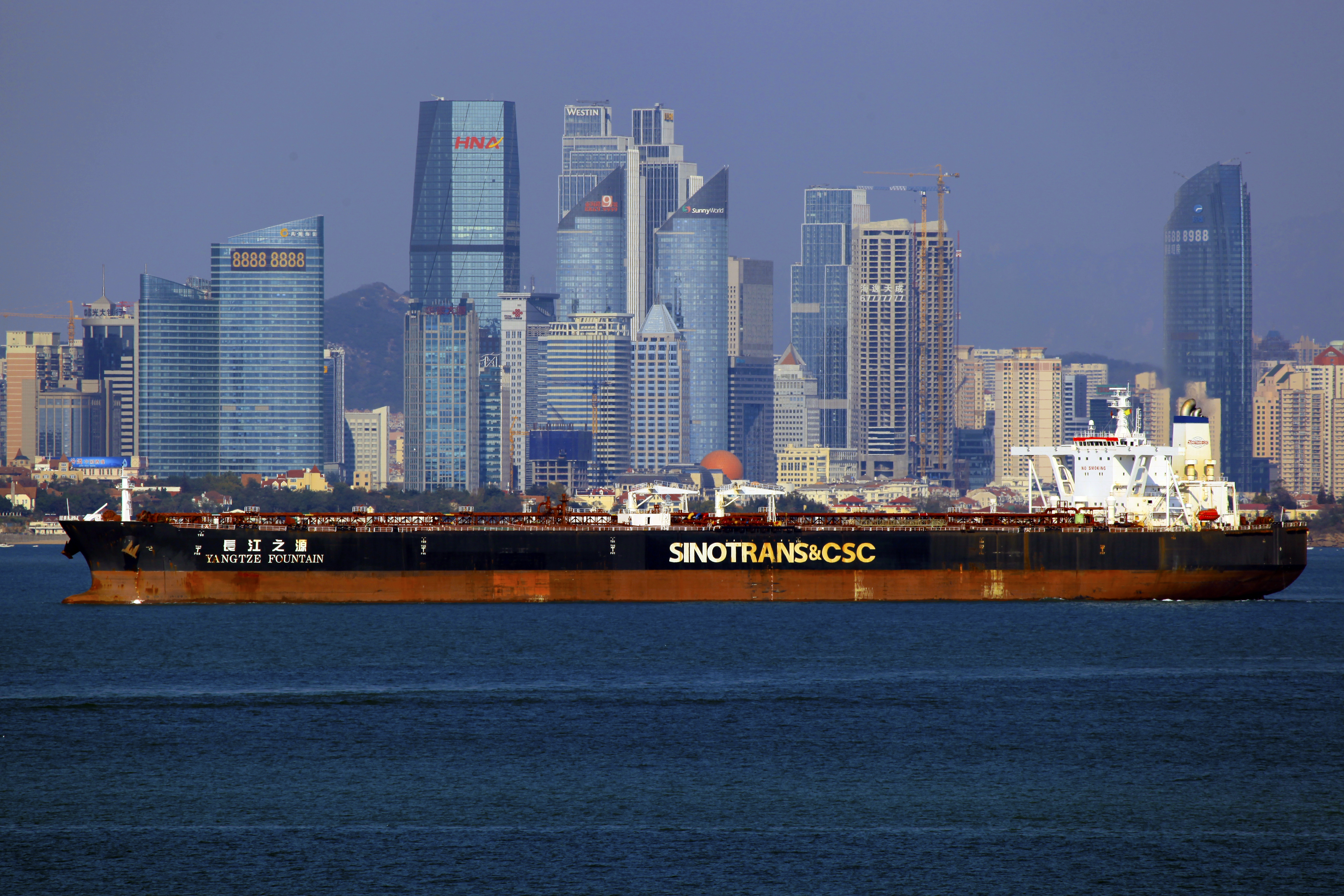 Yangtze Fountain | SINOTRANS&CSC | Qingdao Fushan Bay 長江之源 | 中國外運長航集團有限公司 | 青島浮山灣